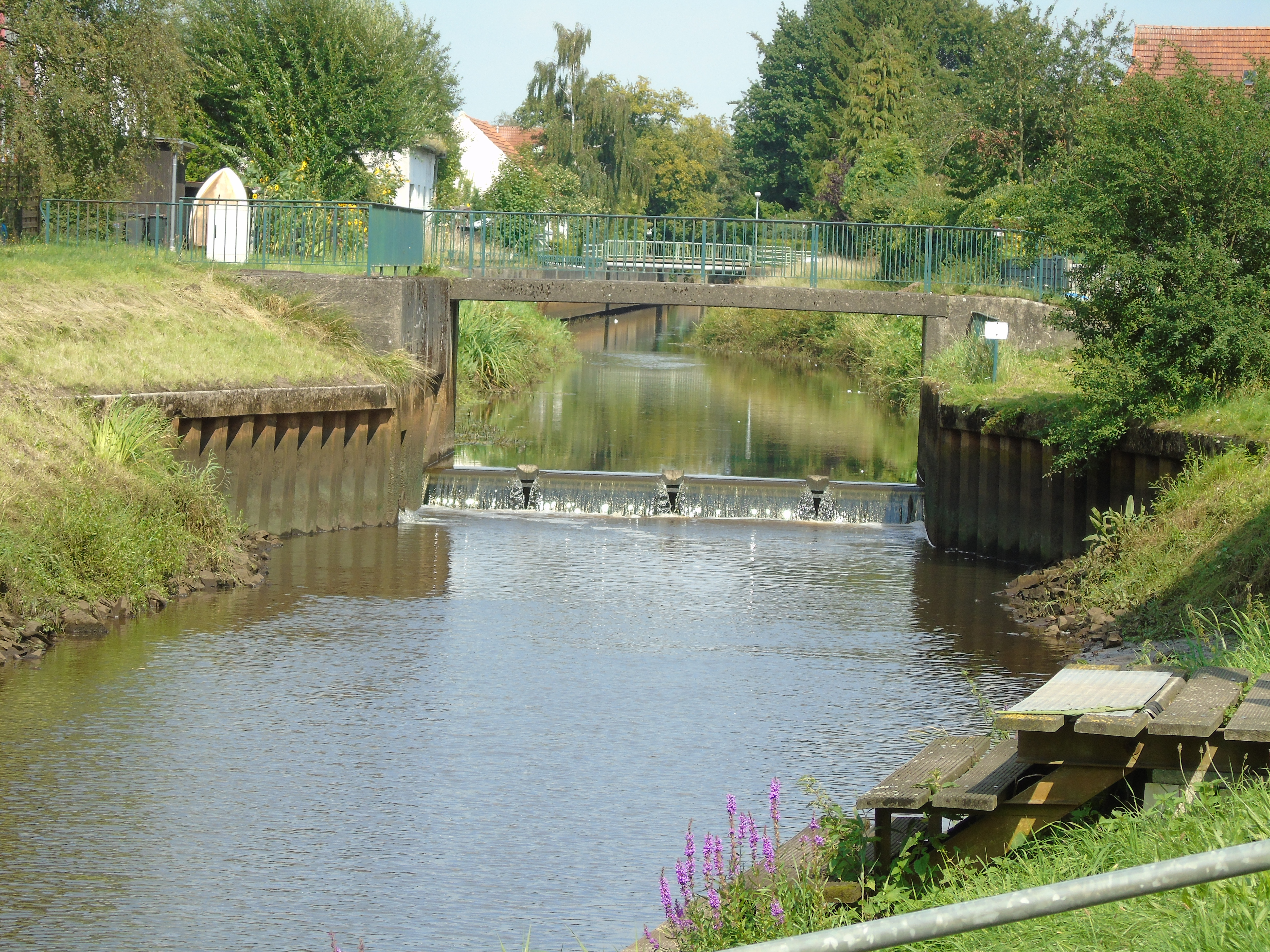 Река Вьорпе при Лилиентал